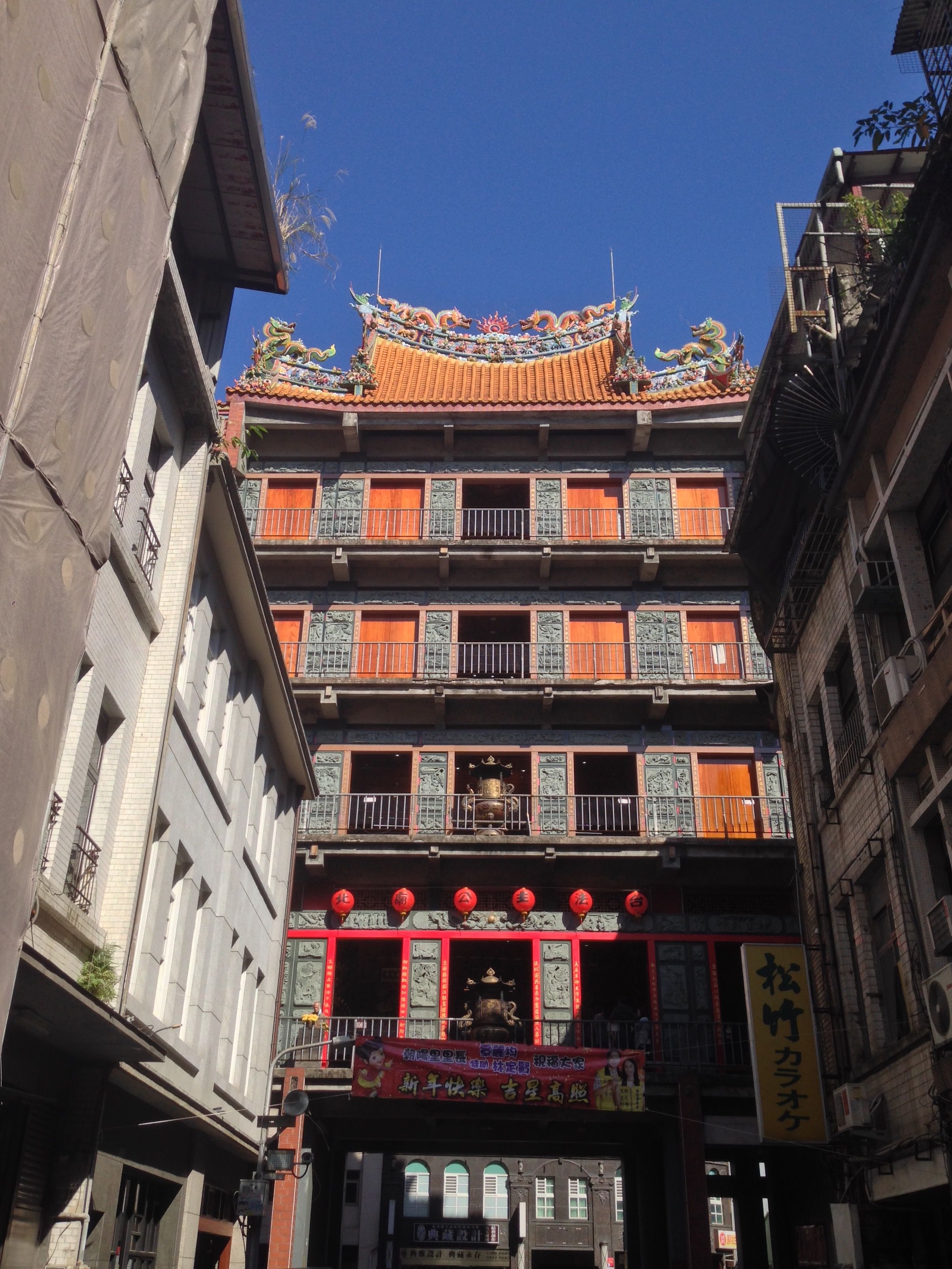 臺北法主公廟